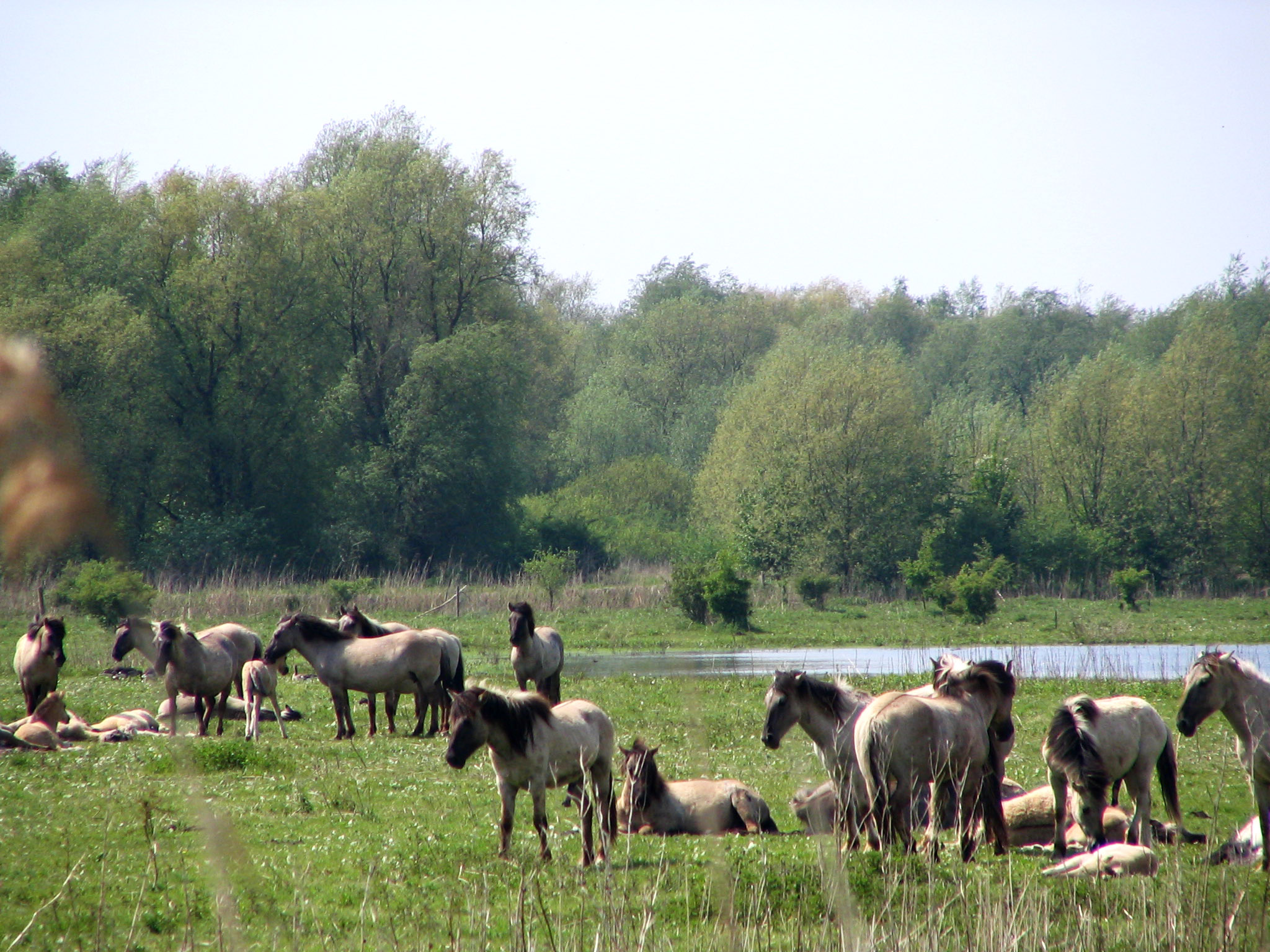 Konik horses in the Oostvaardersplassen, NL